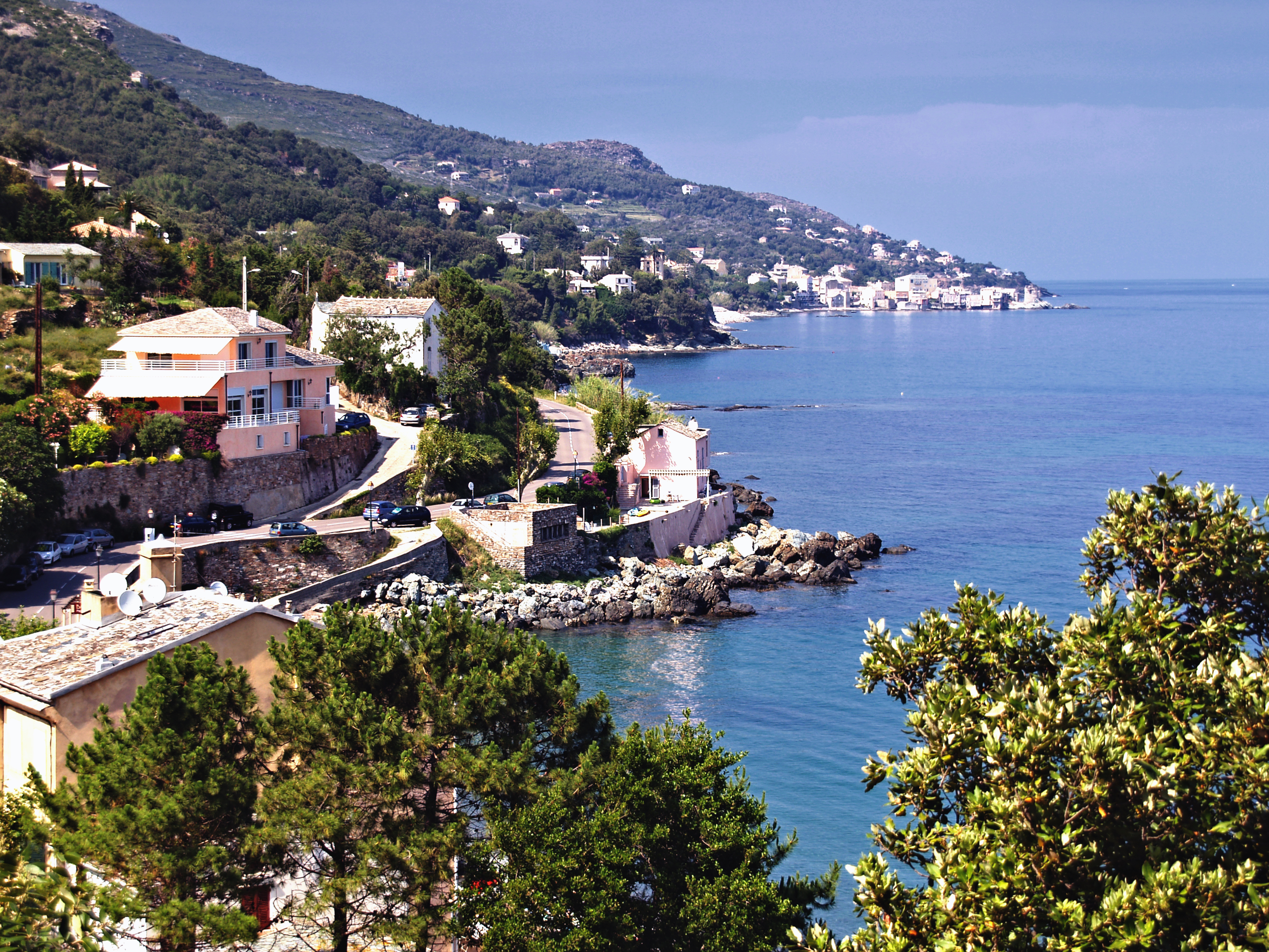 Brando - Littoral de Lavasina à Erbalunga